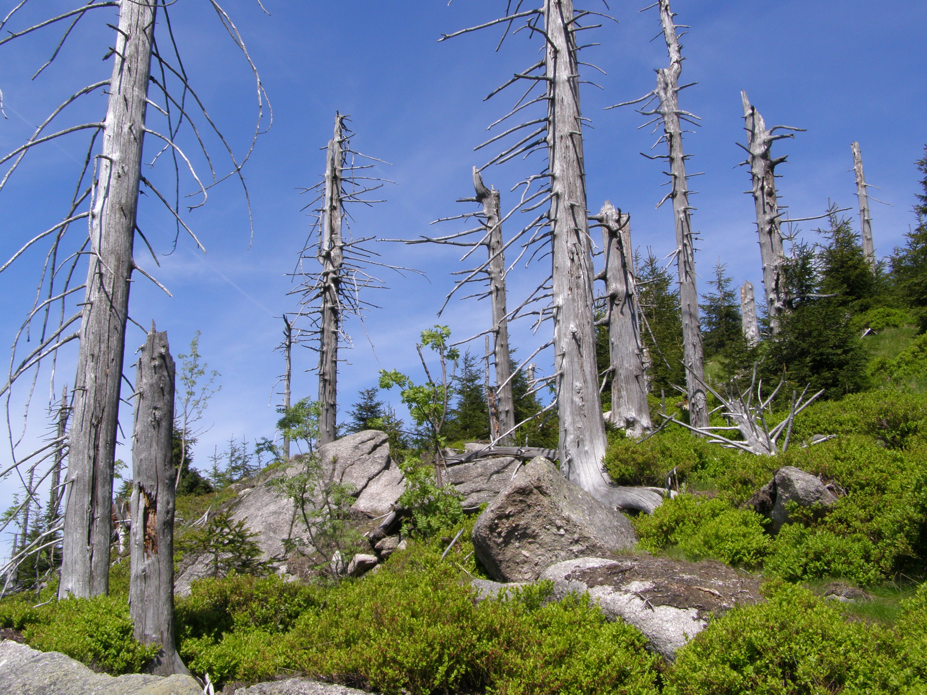 Česky: Jizerské hory, Smědavská hornatina, Prales Jizera na severozápadním úbočí vrcholu Jizera (1122 m)